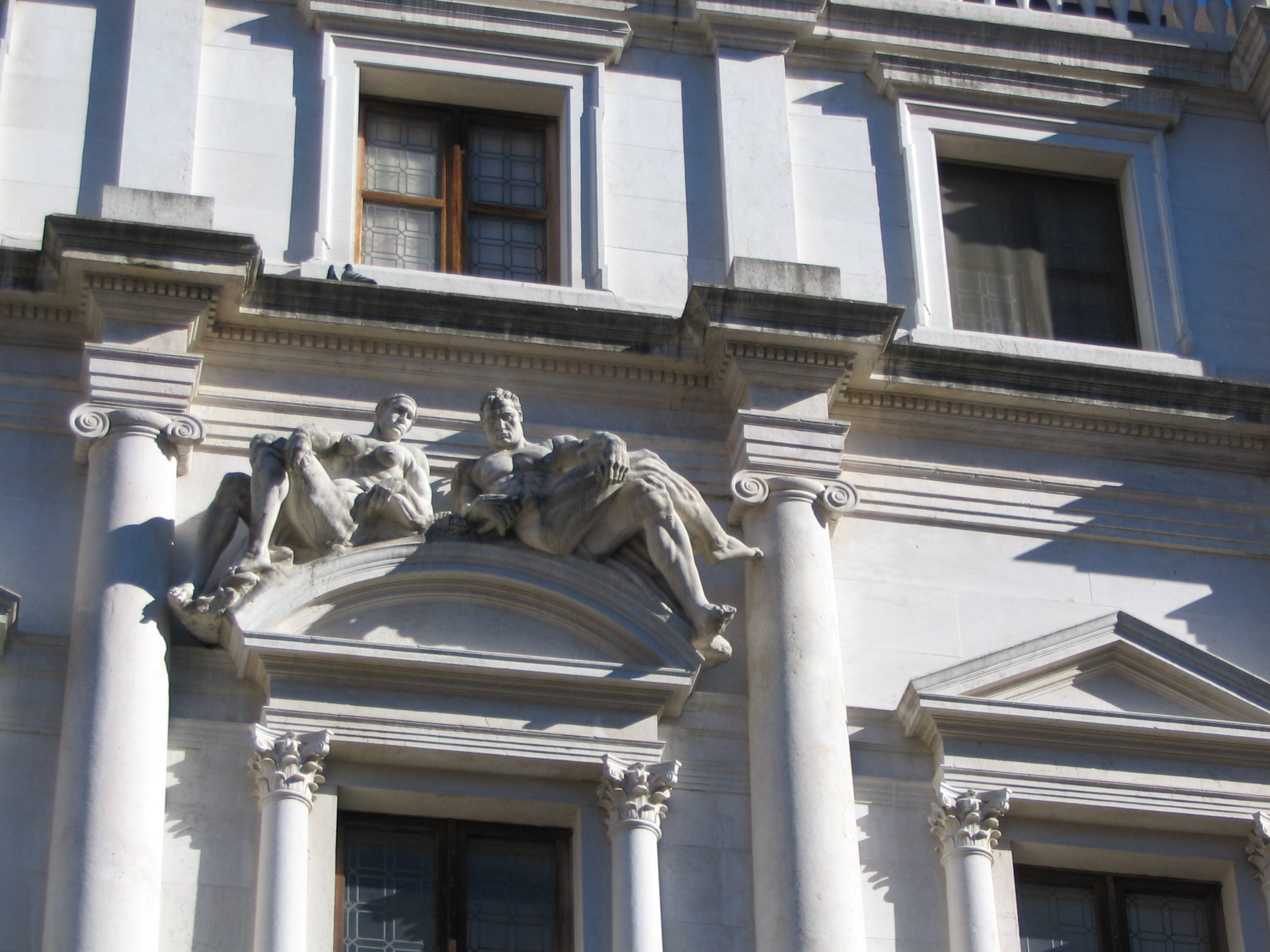 Bergamo, Palazzo Nuovo, statue sulla trabeazione dell'ottavo finestrone da ovest